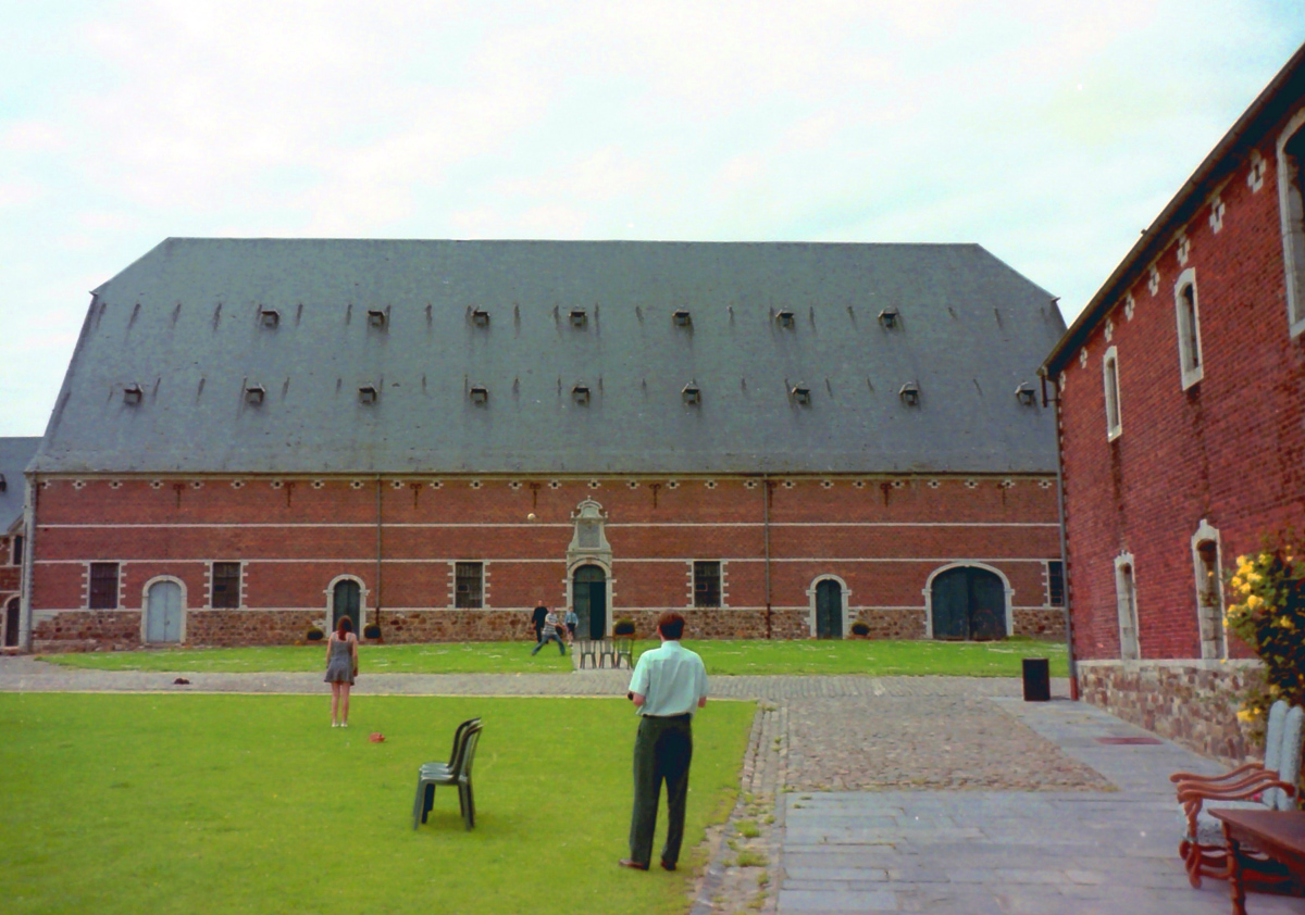 La Ramée - La grange aux blés 01